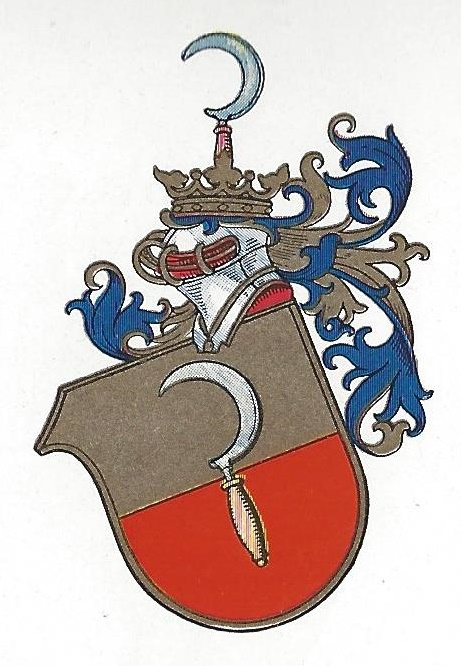 Wappen der Sorabia